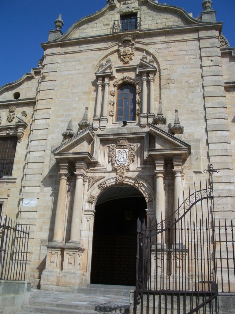 Portada de la Iglesia de Santa Cecilia, Ronda